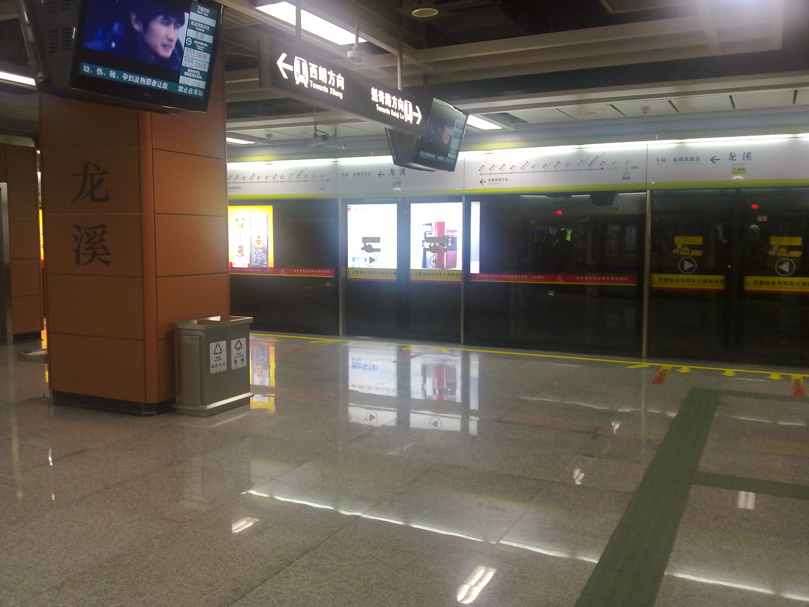 廣佛地鐵龍溪站站台